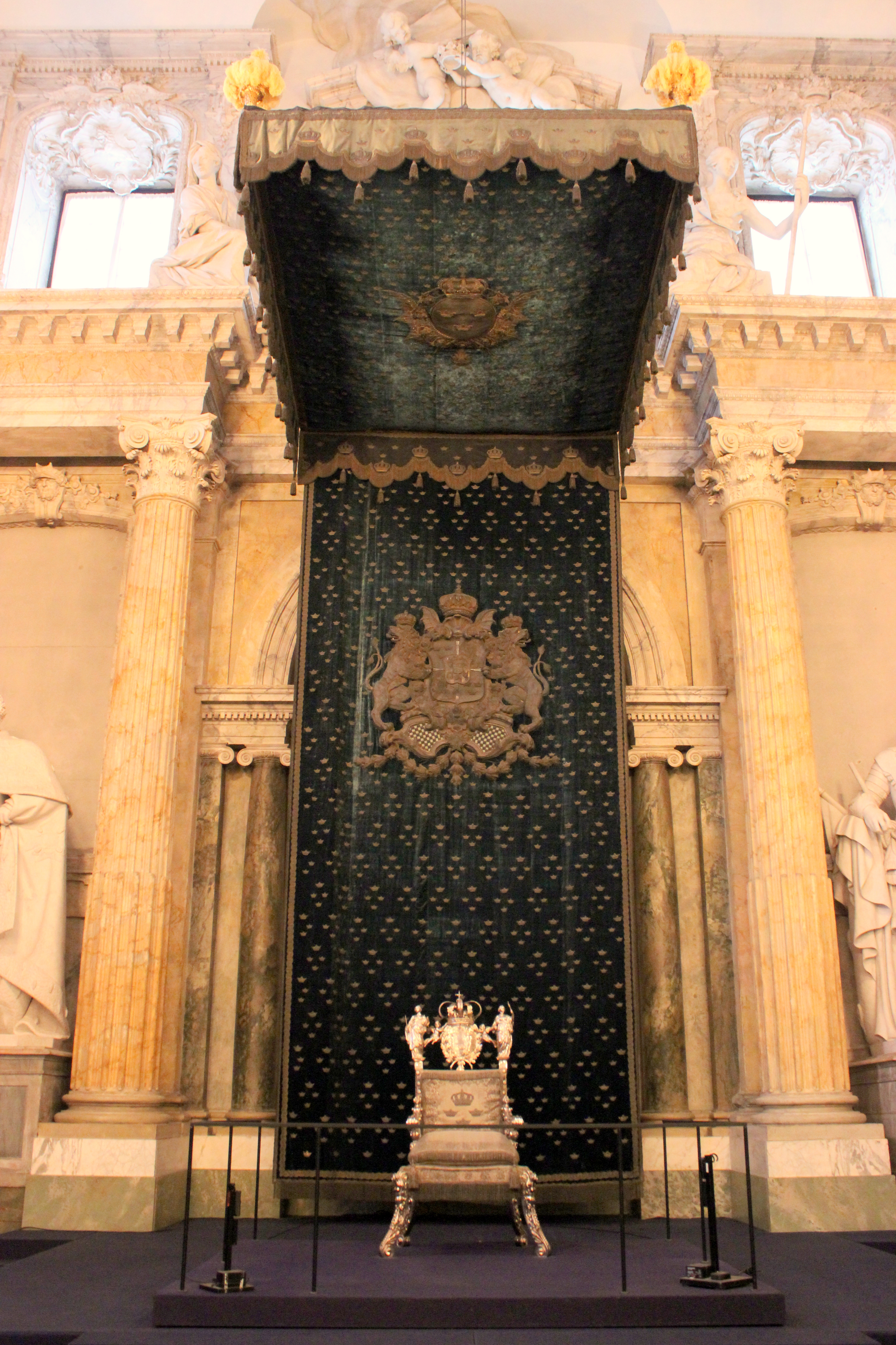 Gamla Stan, Södermalm, Stockholm, Sweden